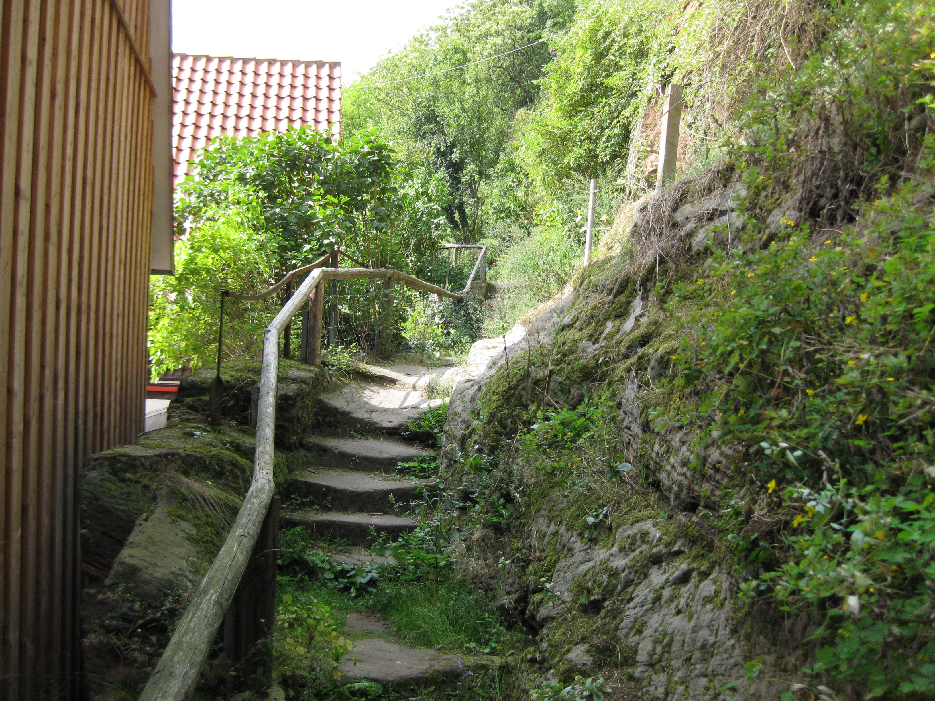 Östliche der drei Felsentreppen vom Dorf Reinhausen auf den Kirchberg